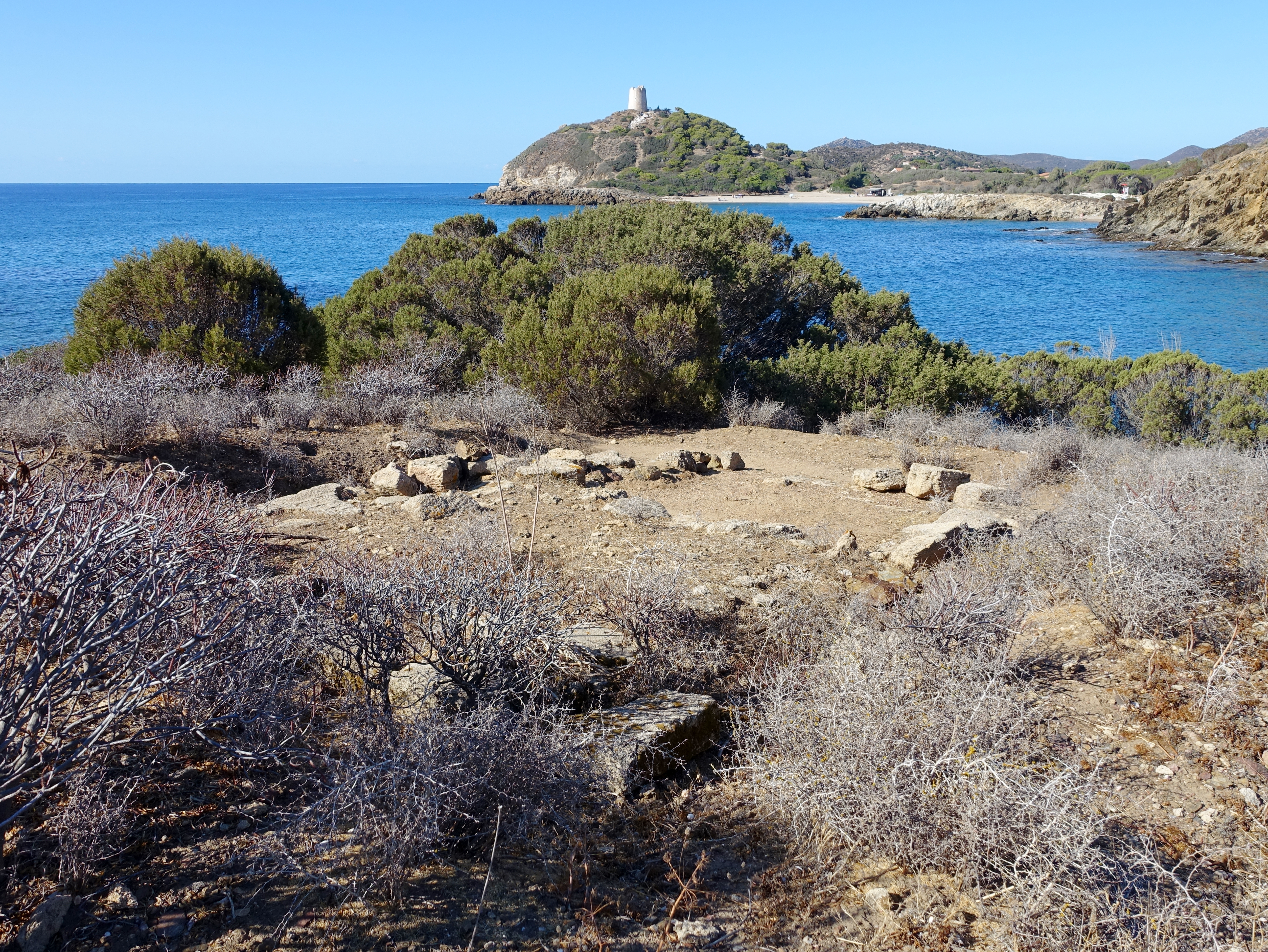 Insel Su Cardolinu (Isola Su Cardolinu), Gemeinde Domus de Maria, Sardinien, Italien